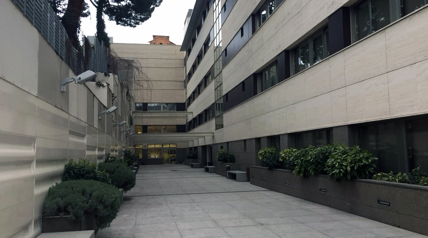 Este campus se encuentra junto al paseo de la Habana, en Madrid, al lado del estadio de fútbol Santiago Bernabéu.